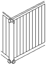 The Fully Developed Sill Technique (fult utviklet svilleteknikk) Sketch by User:ToB (Tom Bjørnstad, Norway)